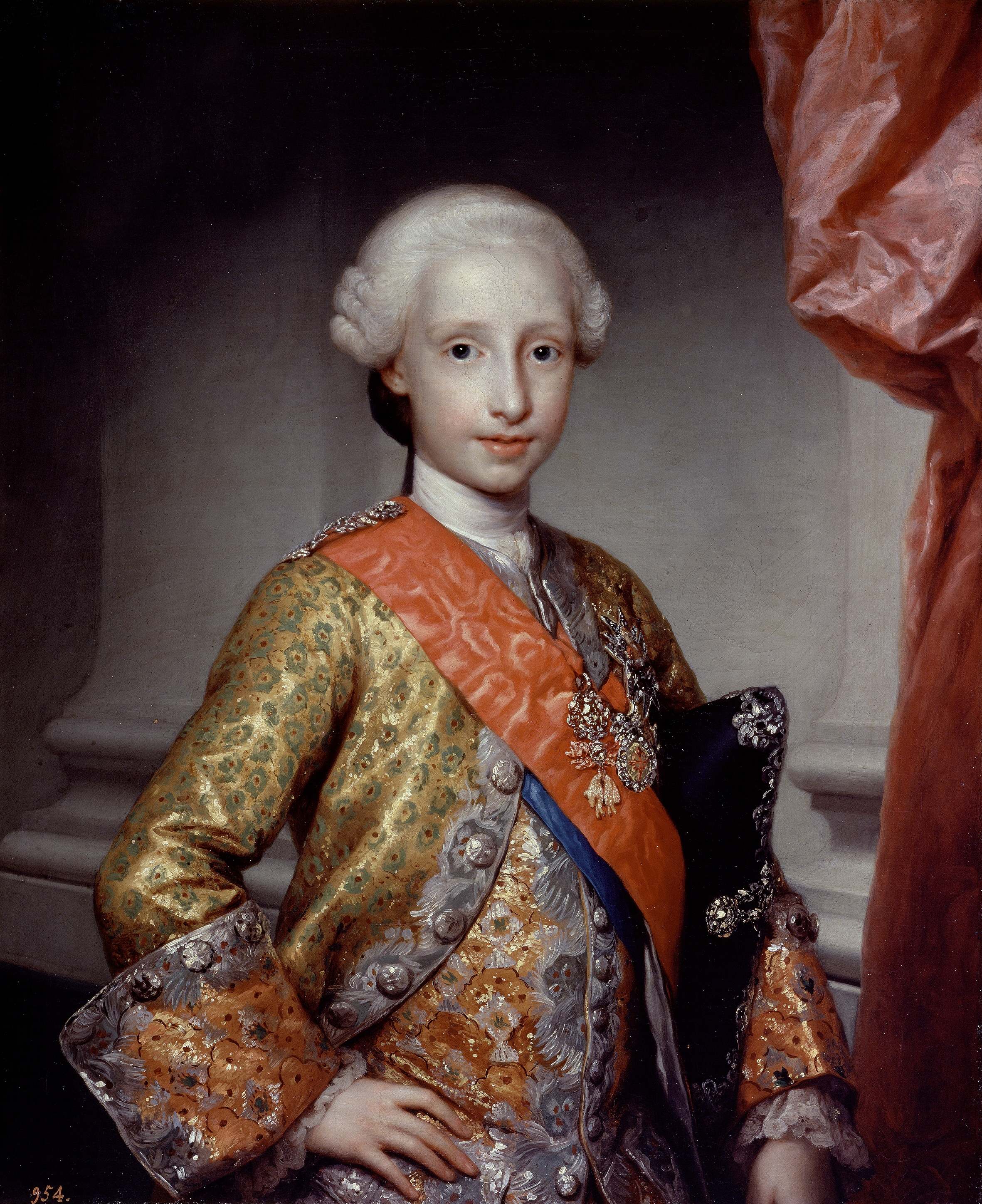 Retrato del infante Antonio Pascual de Borbón (1755-1817), que fue hijo del rey Carlos III de España y de la reina María Amalia de Sajonia.